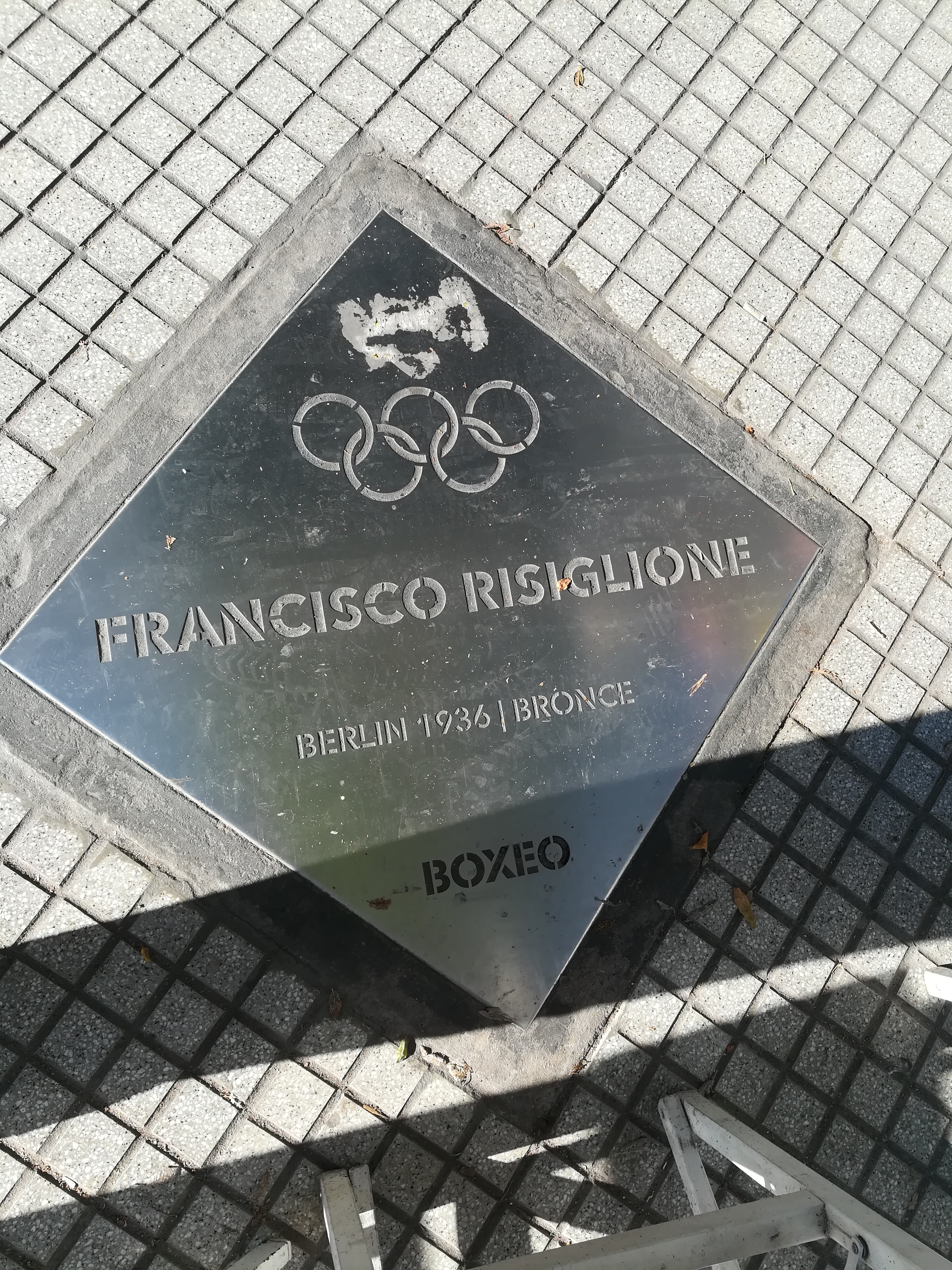 Paseo de los Olímpicos de los en la Avenida Pellegrini (Rosario).